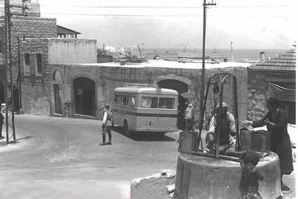 A well at the corner of the Burj St (today Mawaleh Hashichrur). and Stanton St.(today Shivat Zion), Haifa בפינה של רחוב הבורג' (היום רחוב מעלה השחרור) וחוב סטנטון (היום רחוב שיבת ציון) נשאבו מים מבאר